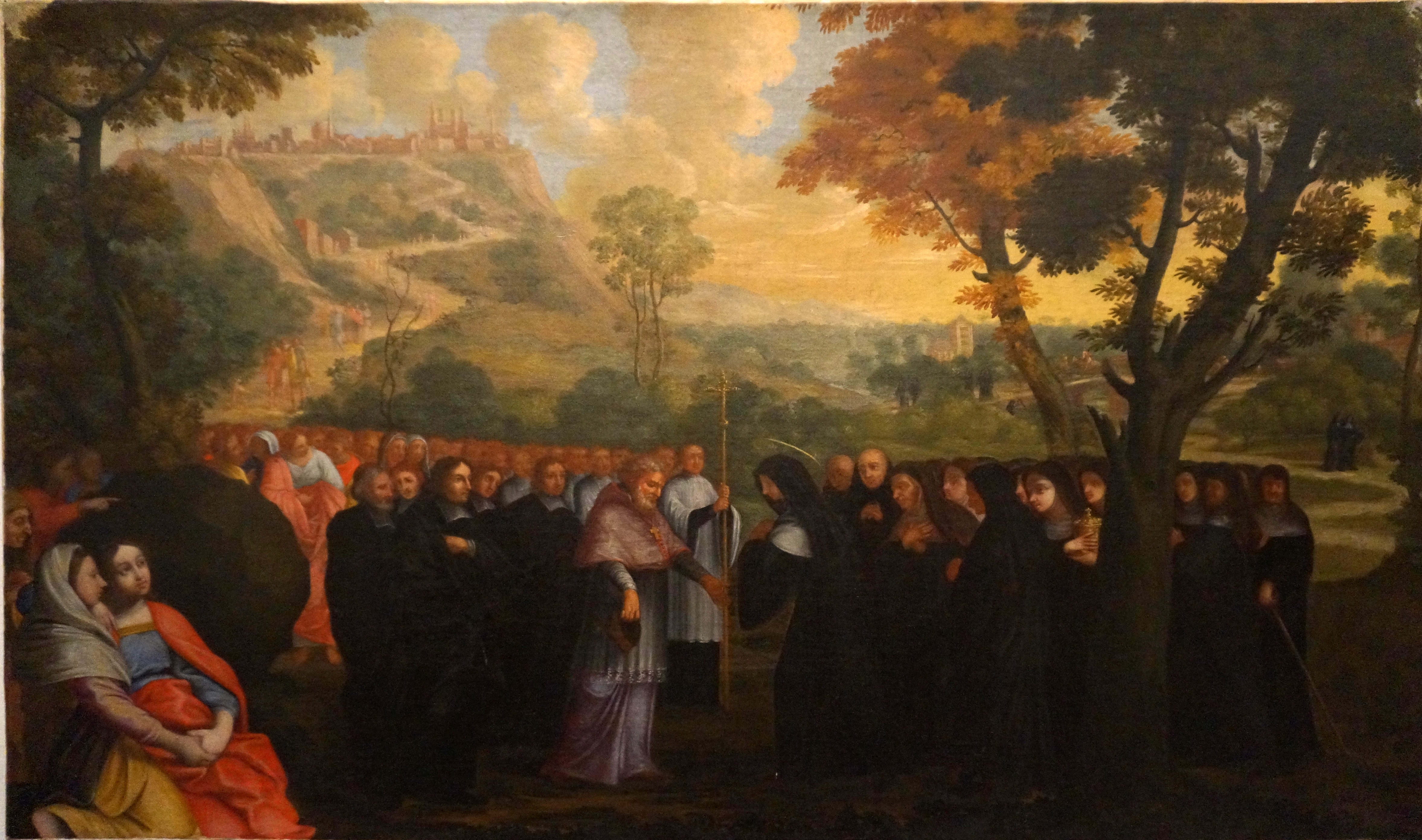 peintures présentées au musée de Laon.